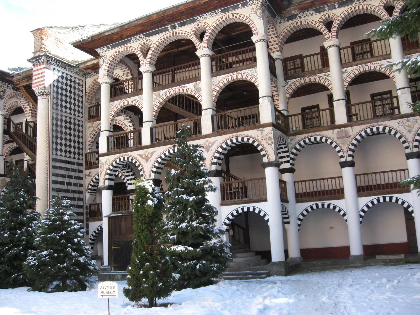 Rilski manastir, unutrašnjost zimi. Slikano 2010. godine.